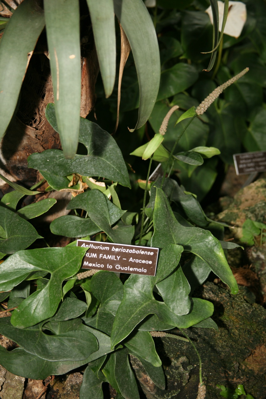 Anthurium beriozabalense